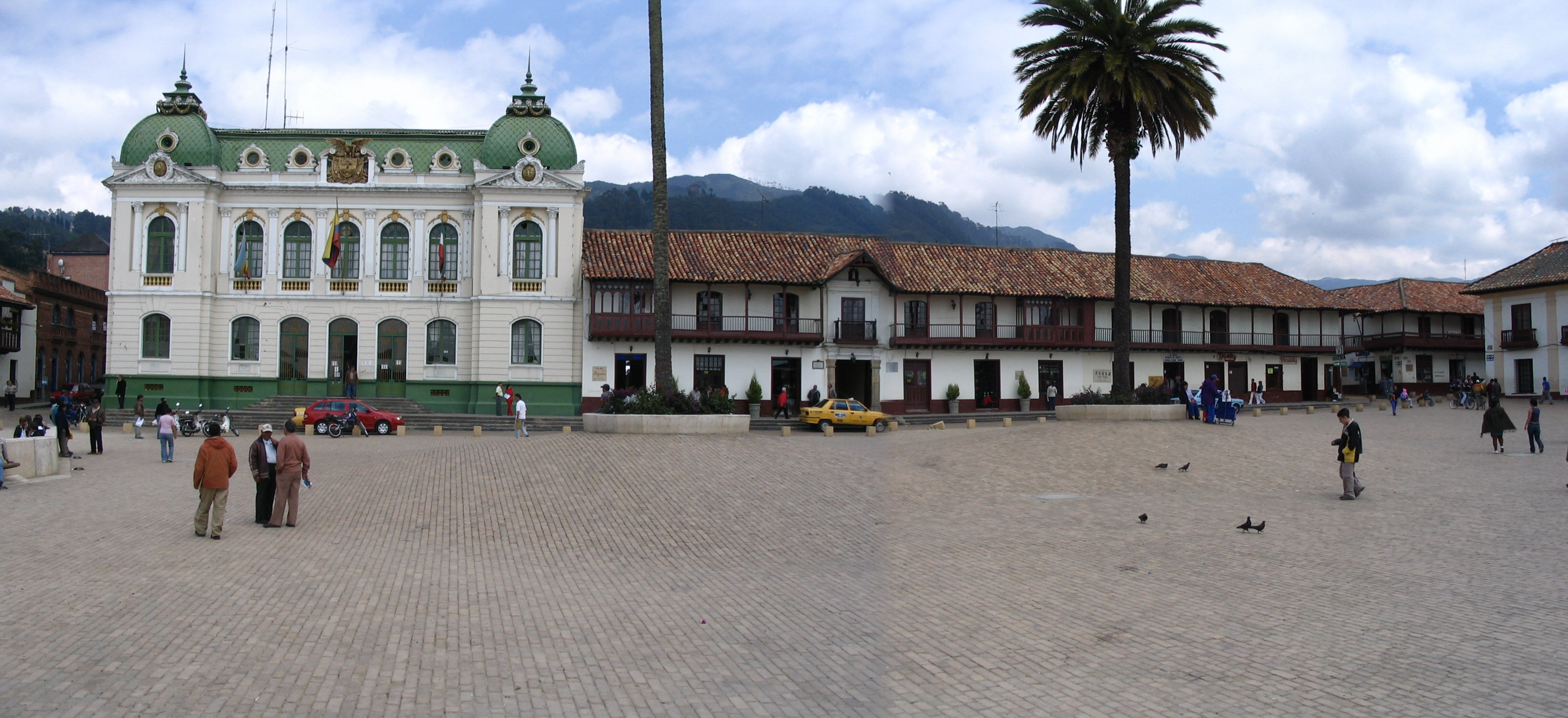 Zipaquira Main Square